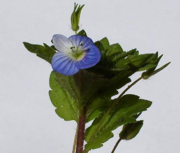 Veronica persica, taken in Santiago de Compostela, Spain